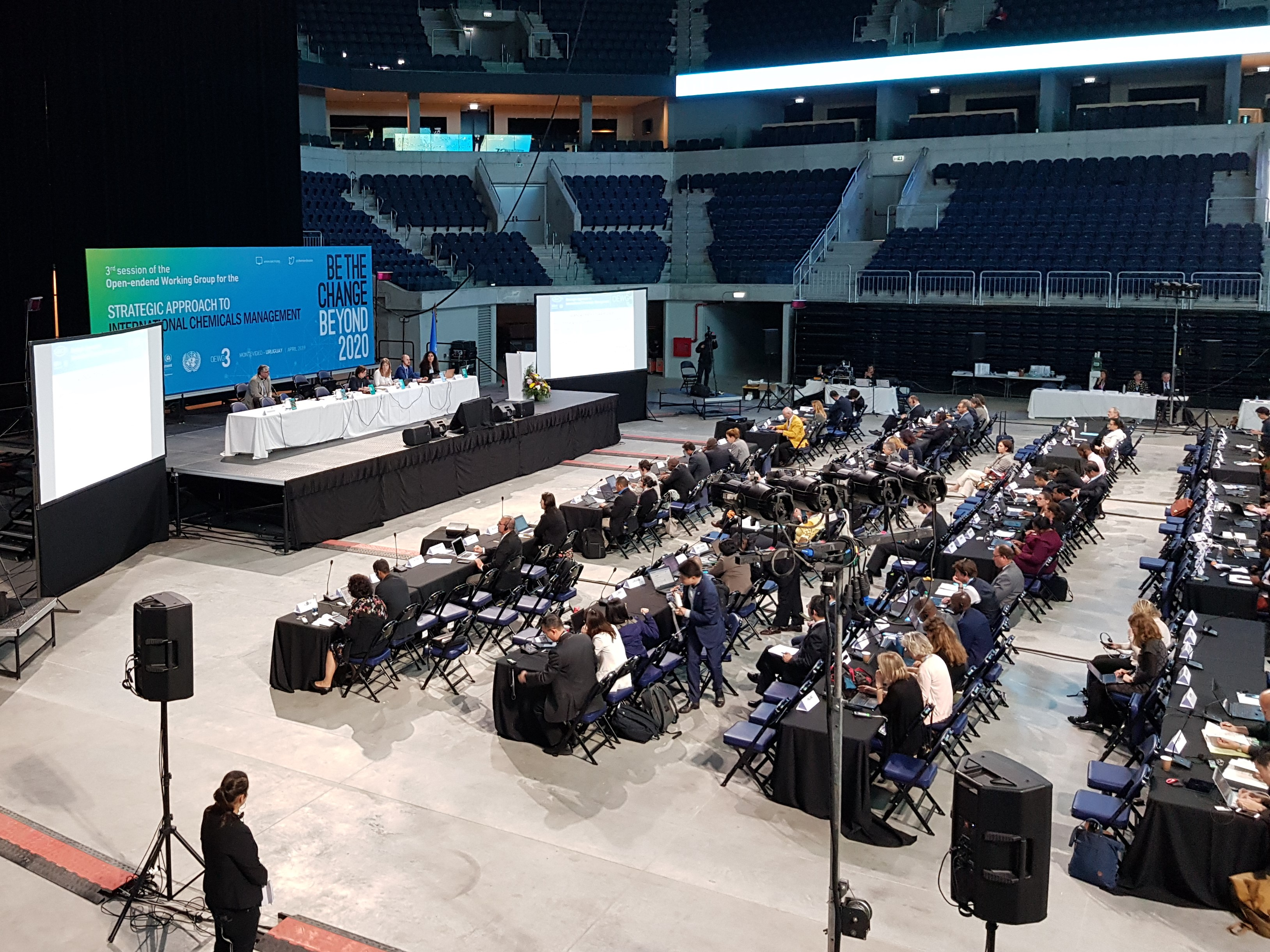 Bild der Verhandlungen auf dem dritten Treffen der Open-ended Working Group zum Strategischen Ansatz zum internationalen Chemikalienmanagement.